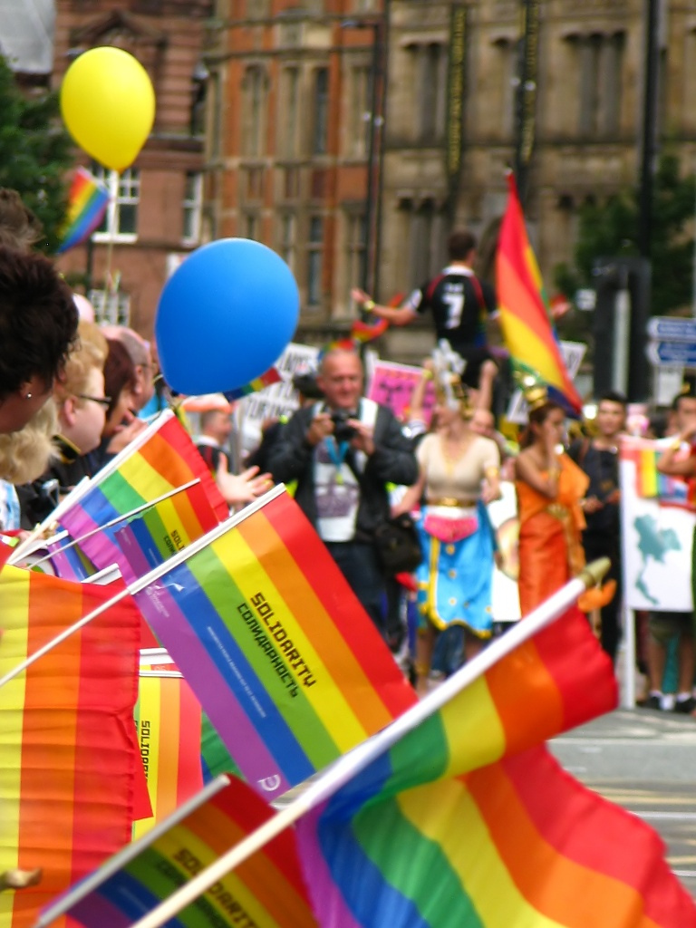 Flag Party